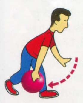 Segundo paso.